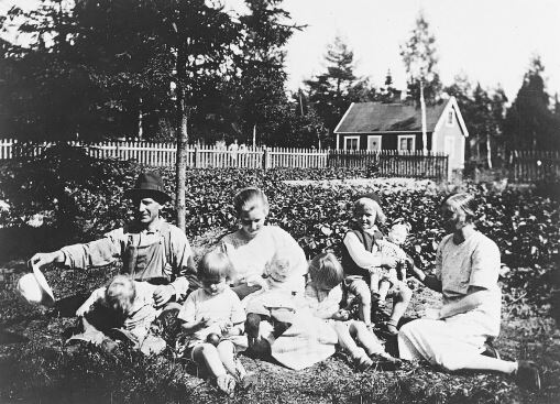 Familjen Nordström i gräset vid potatislandet på dåvarande Sågarvägen - idag Lovisedalsvägen 3 i Lovisedal. Stugan i bakgrunden ligger på den tomt på Erstaviksvägen där senare Björns affär byggdes.